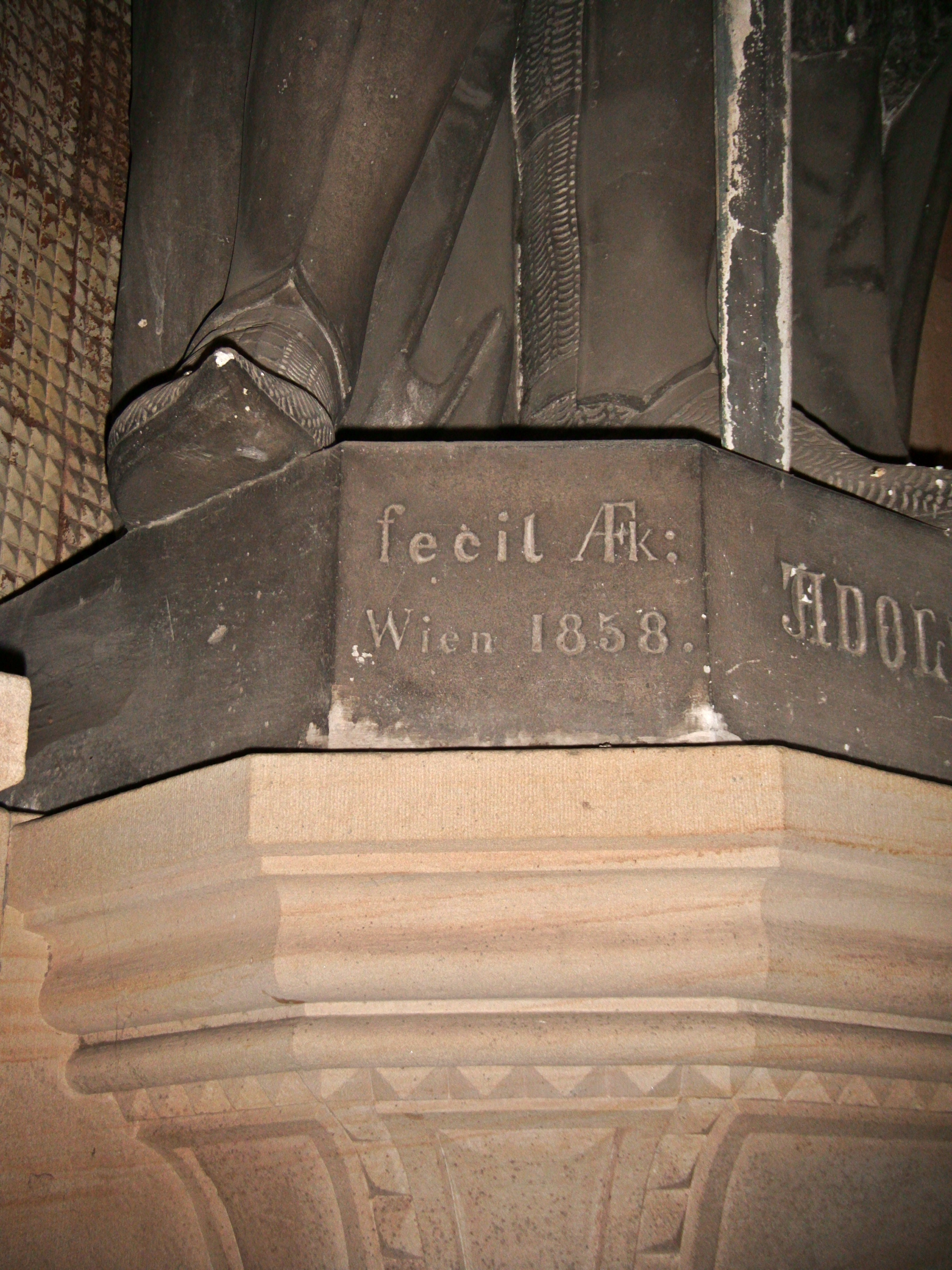 Anton Dominik Fernkorn (1813-1878); Werksignatur an der Großstatue Königs Adolf von Nassau, im Speyerer Dom, 1858